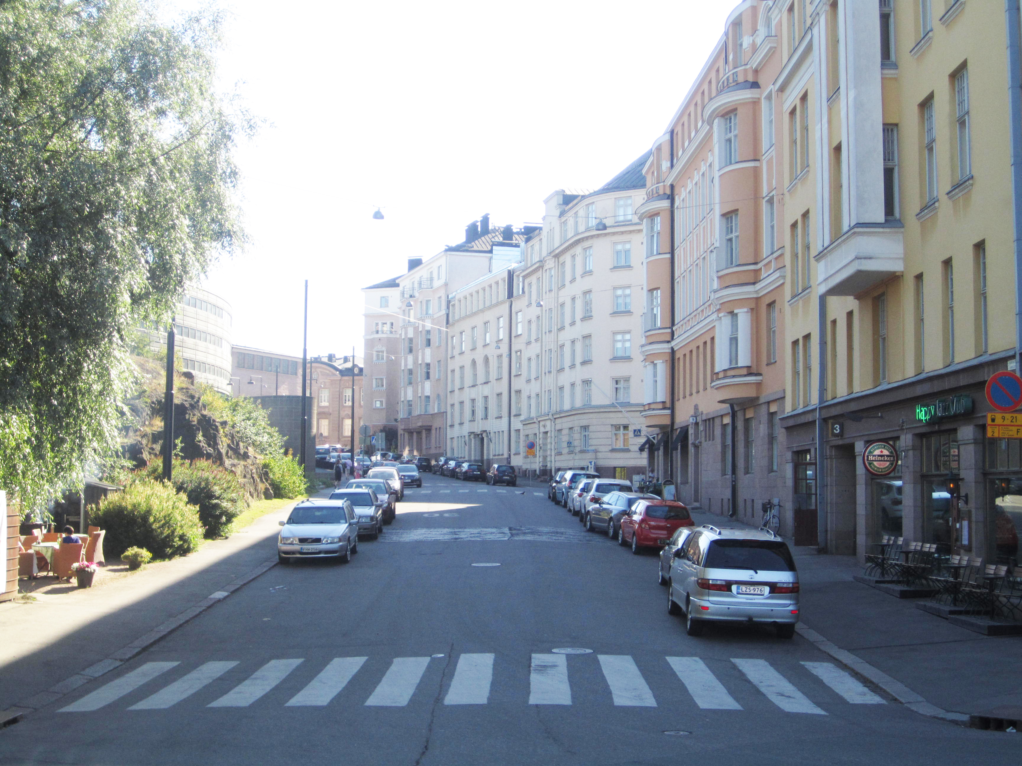 Aurorankatu Etu-Töölössä, Helsingissä.